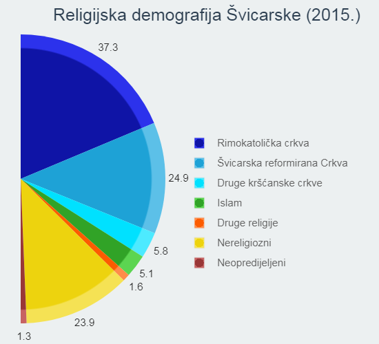 Religijska demografija Švicarske iz 2015.